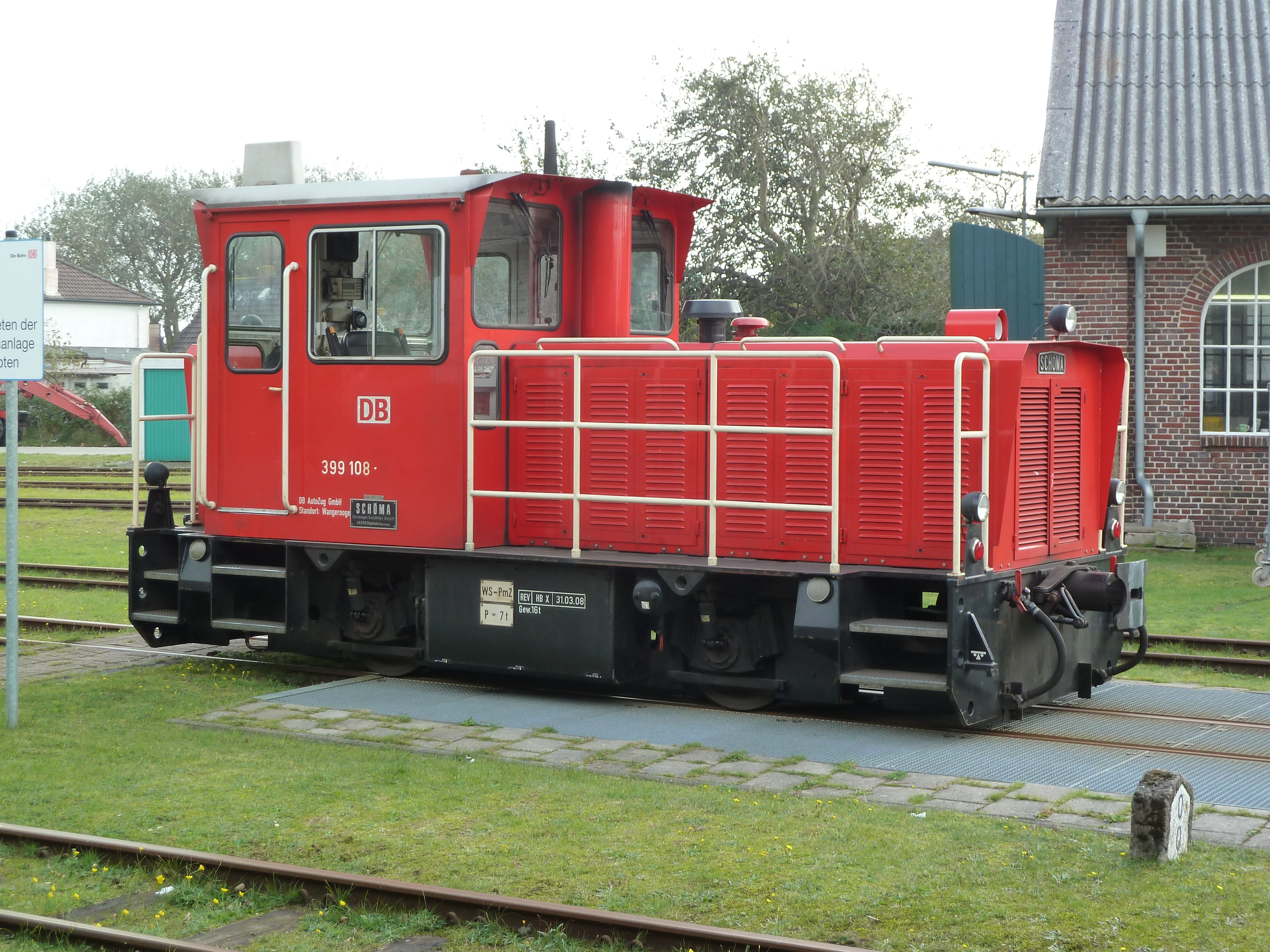 Diesellokomotive 399 108 Typ CFL 150 DCL (Schöma 5600/1999 , B dh) Wangerooge